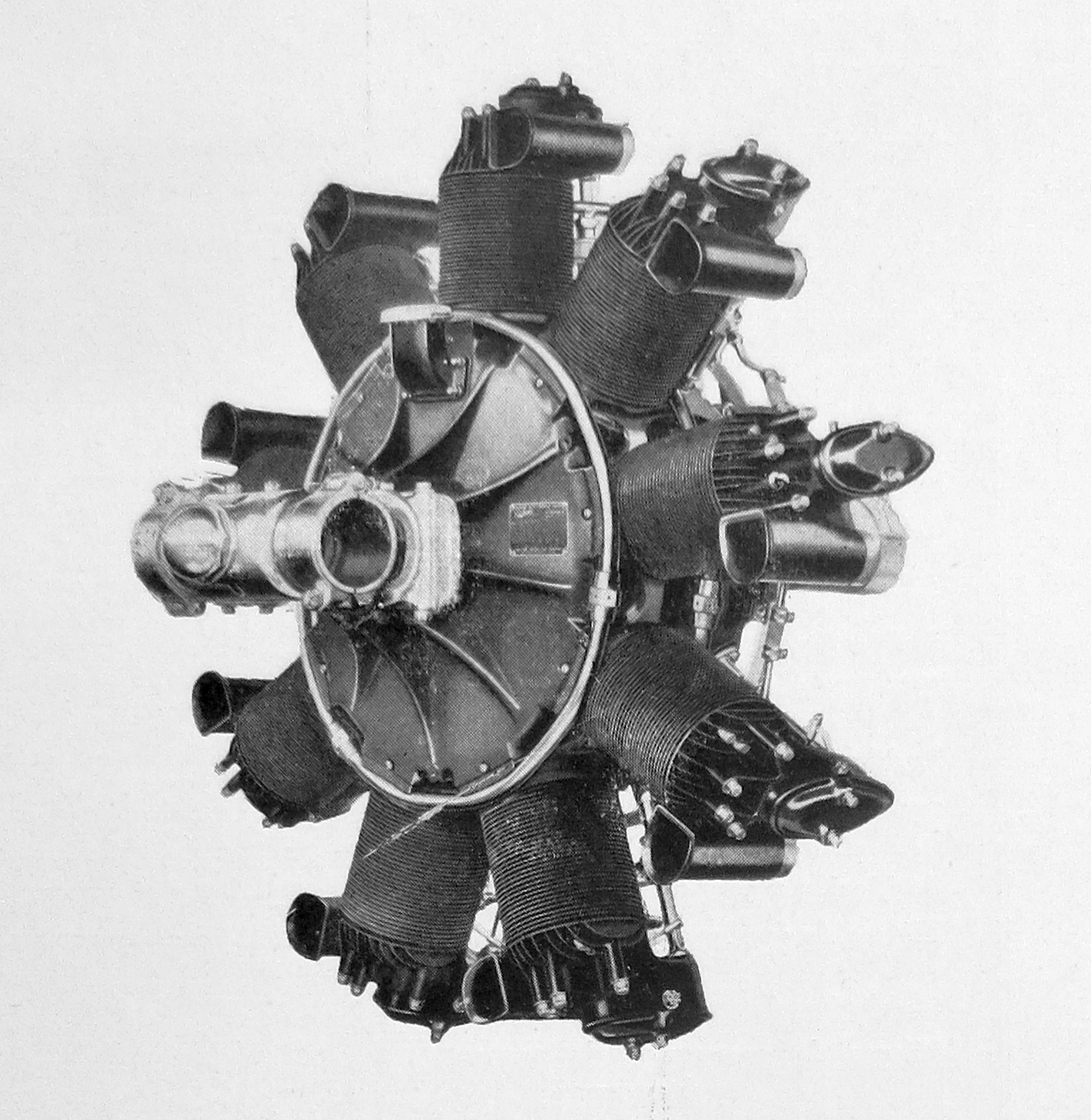 Walter Packard Diesel DR-980 (1932)